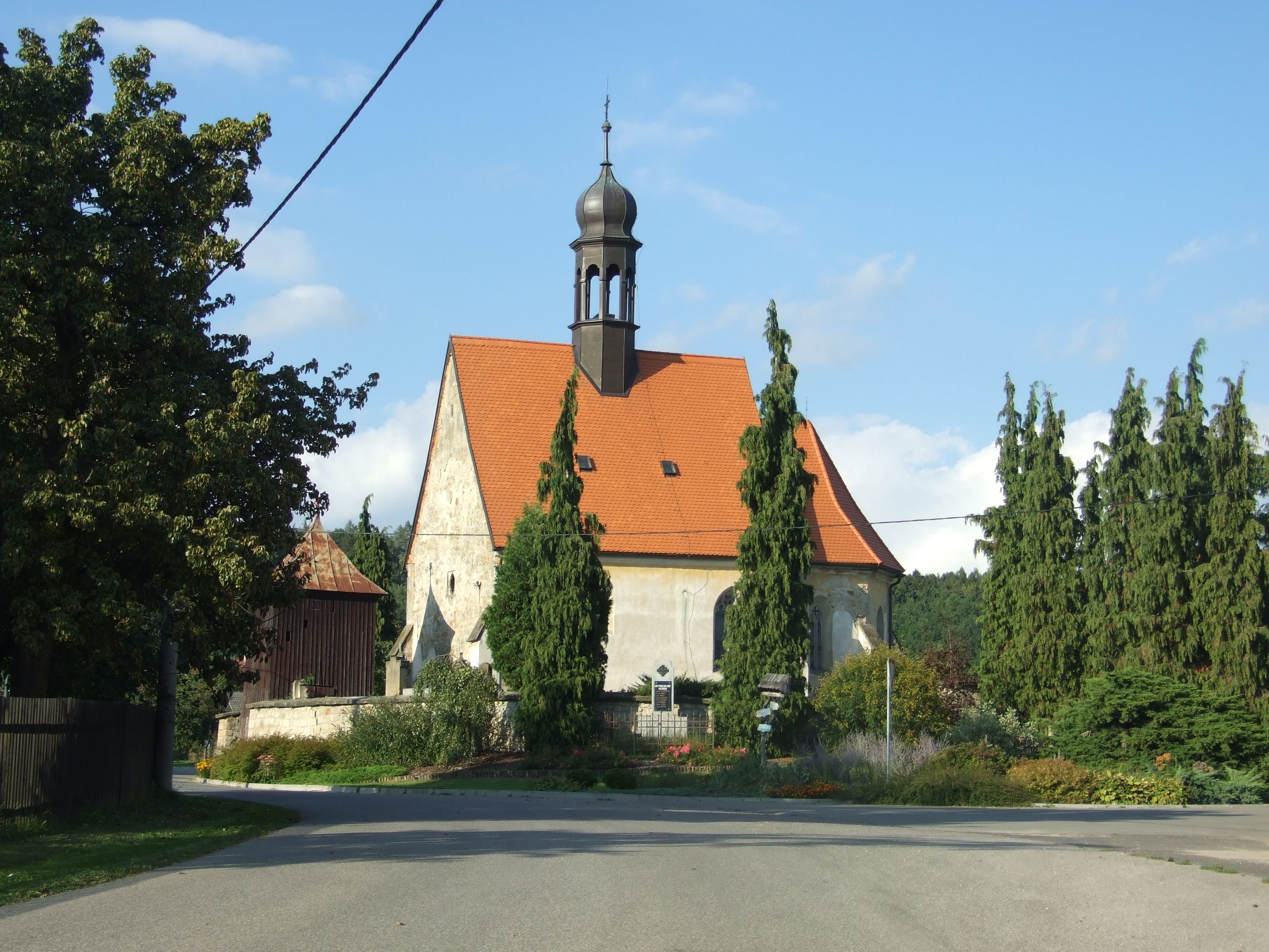 Střevač-Nadslav, okres Jičín. Kostel sv. Prokopa.